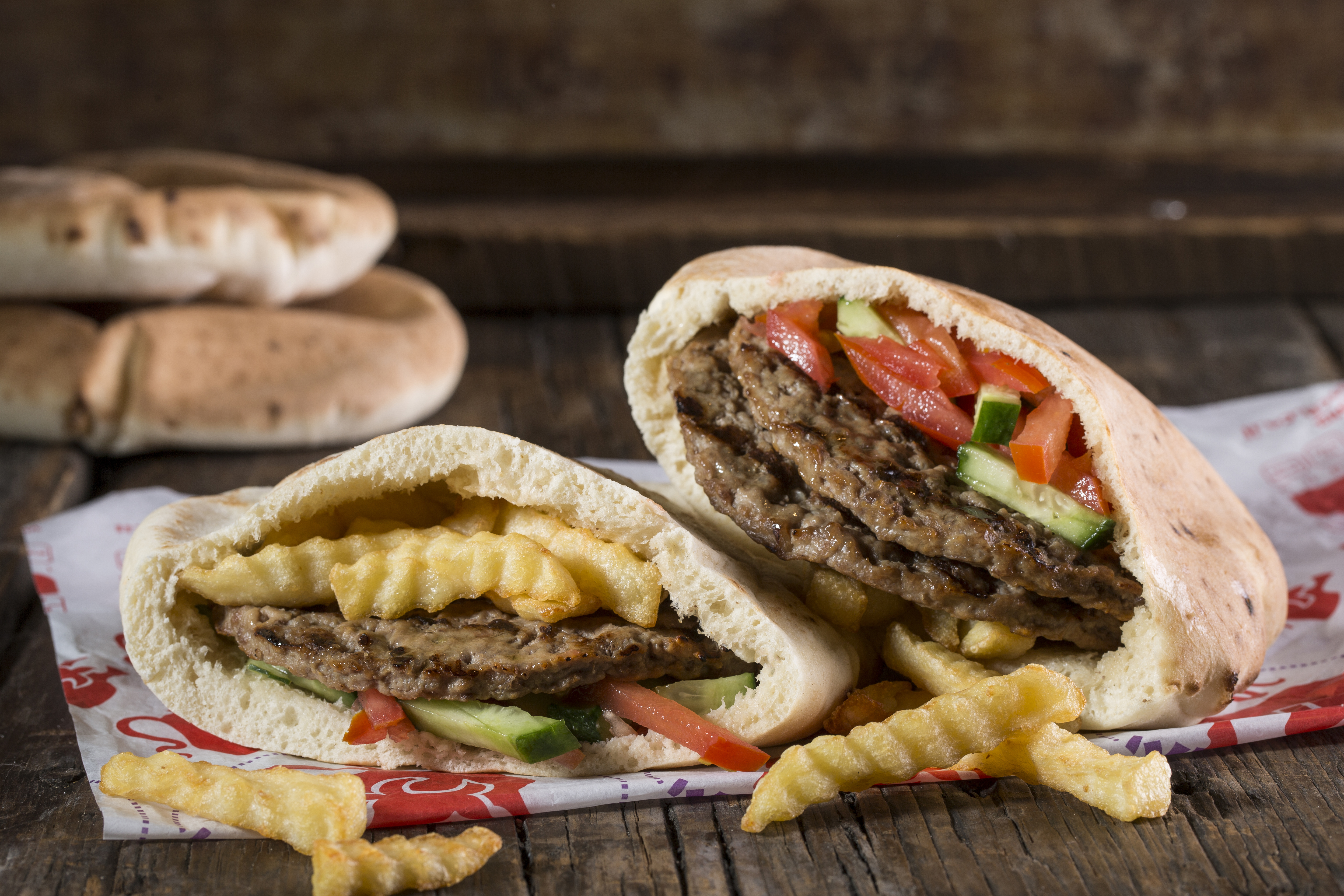 פיתה עם : המבורגר, צ'יפס סלט!